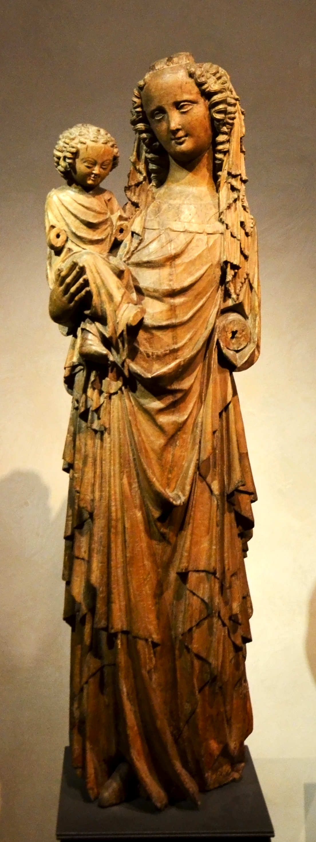 Michelská madona, Mistr Michelské madony (kolem roku 1340), Národní galerie v Praze